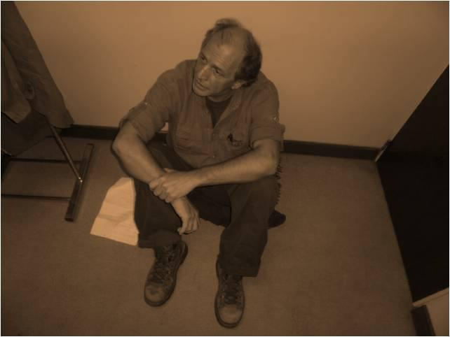 Rubén Rolandi, detrás del escenario antes de realizar una de sus presentaciones.